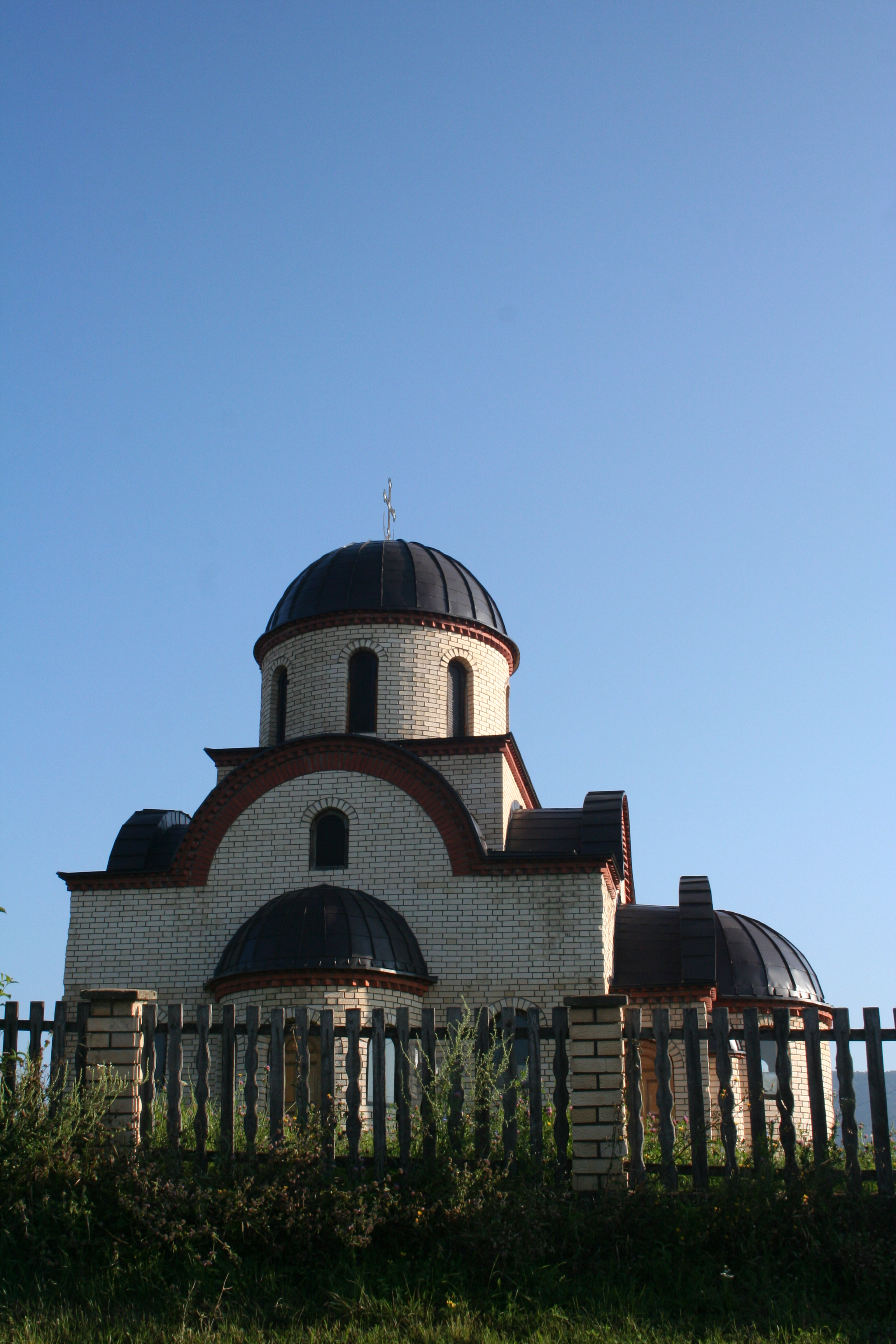 Crkva Svete Trojice, Trbosilje